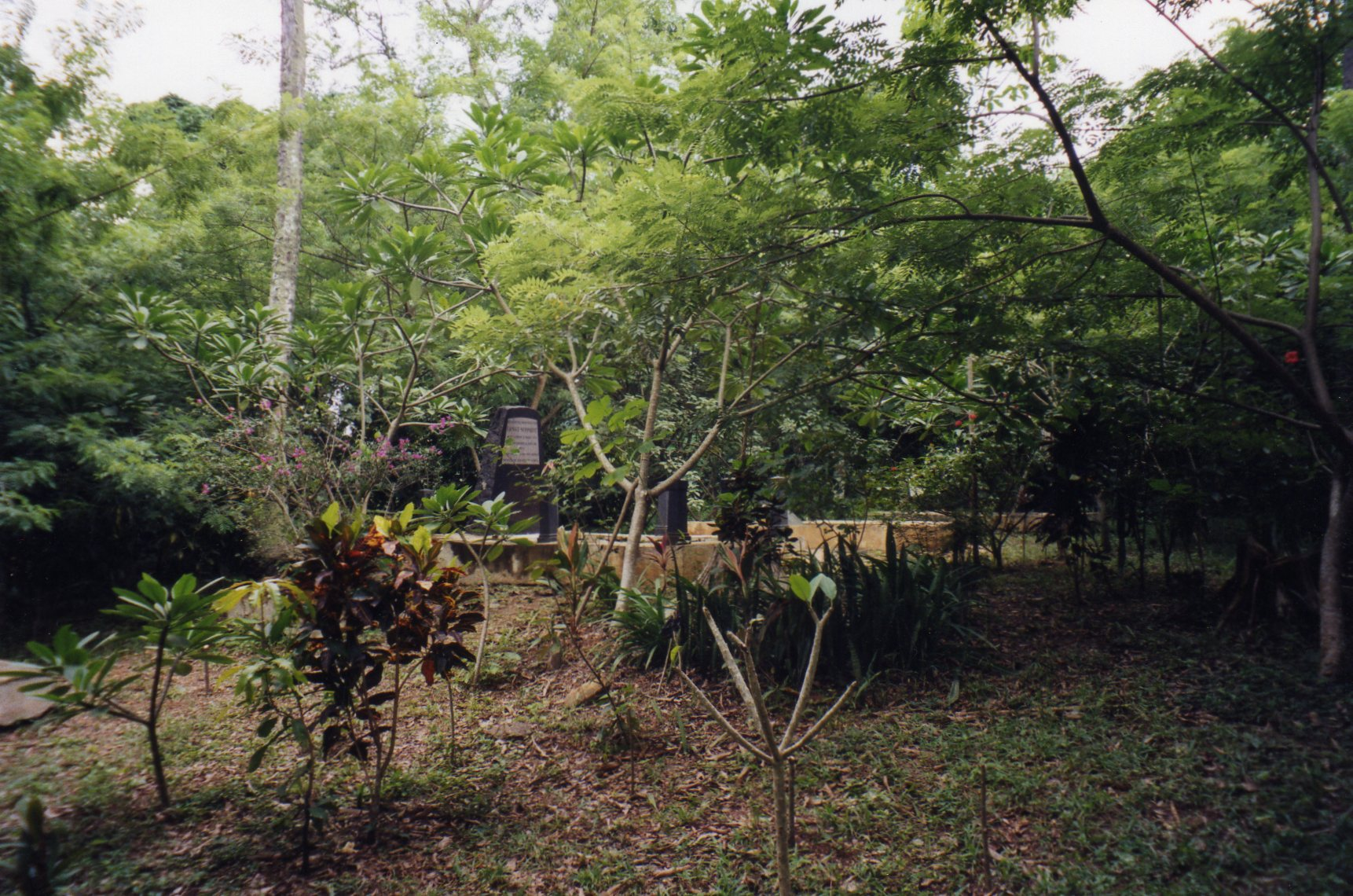 Deutscher Soldatenfriedhof in Missahohé, Togo